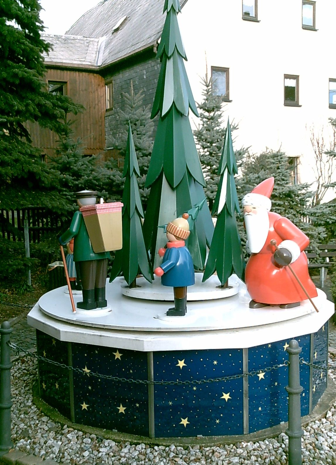 lebensgroße Freiland-Variante einer Spieldose in Winter- und Sommer-Variante (hier Wintervariante)